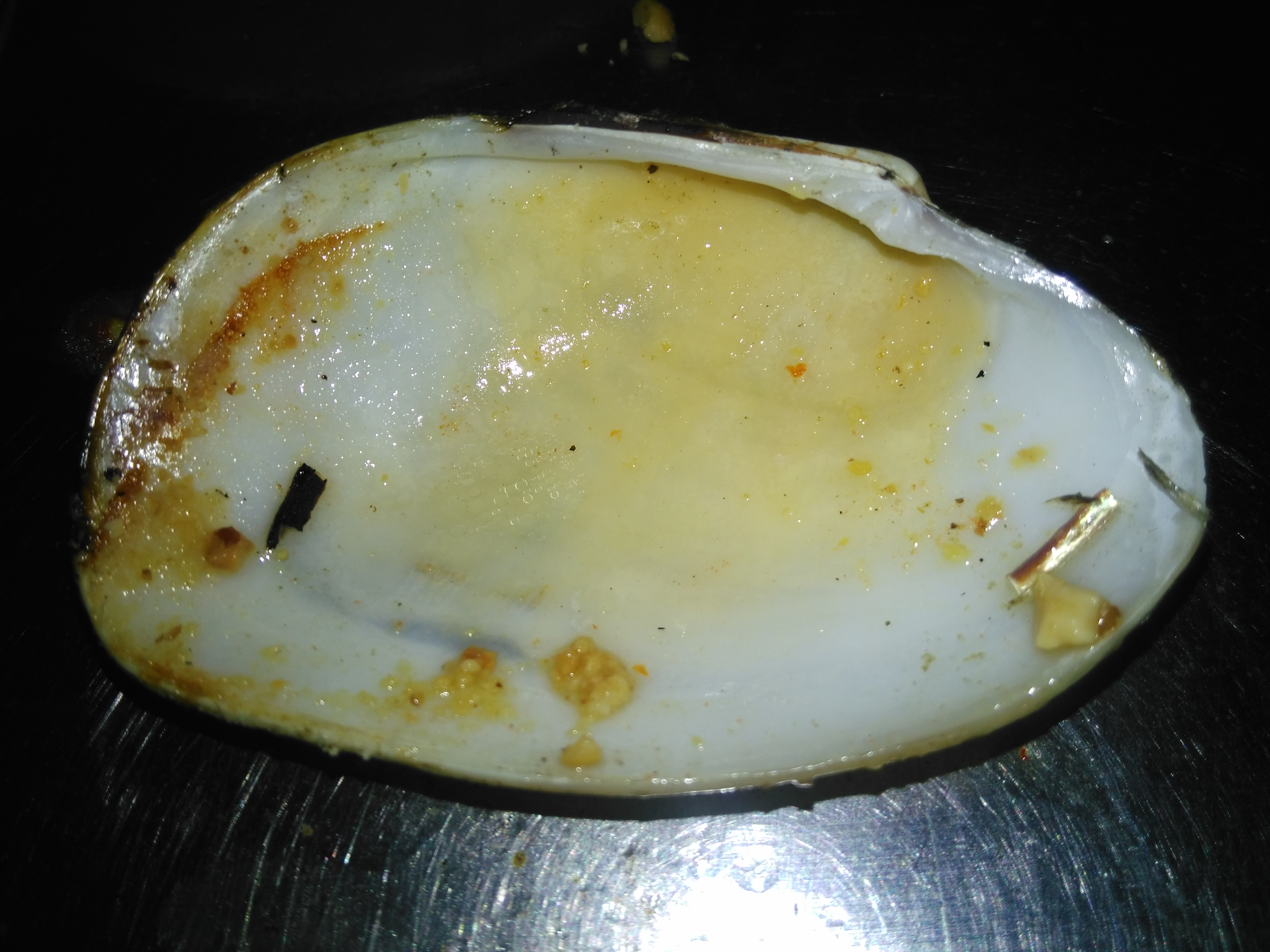 Vỏ sò lụa